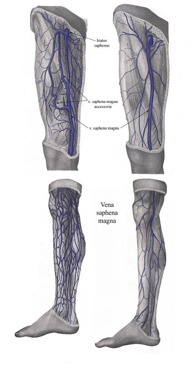 Se observa la vena safena magna en la pierna abajo y en el muslo arriba